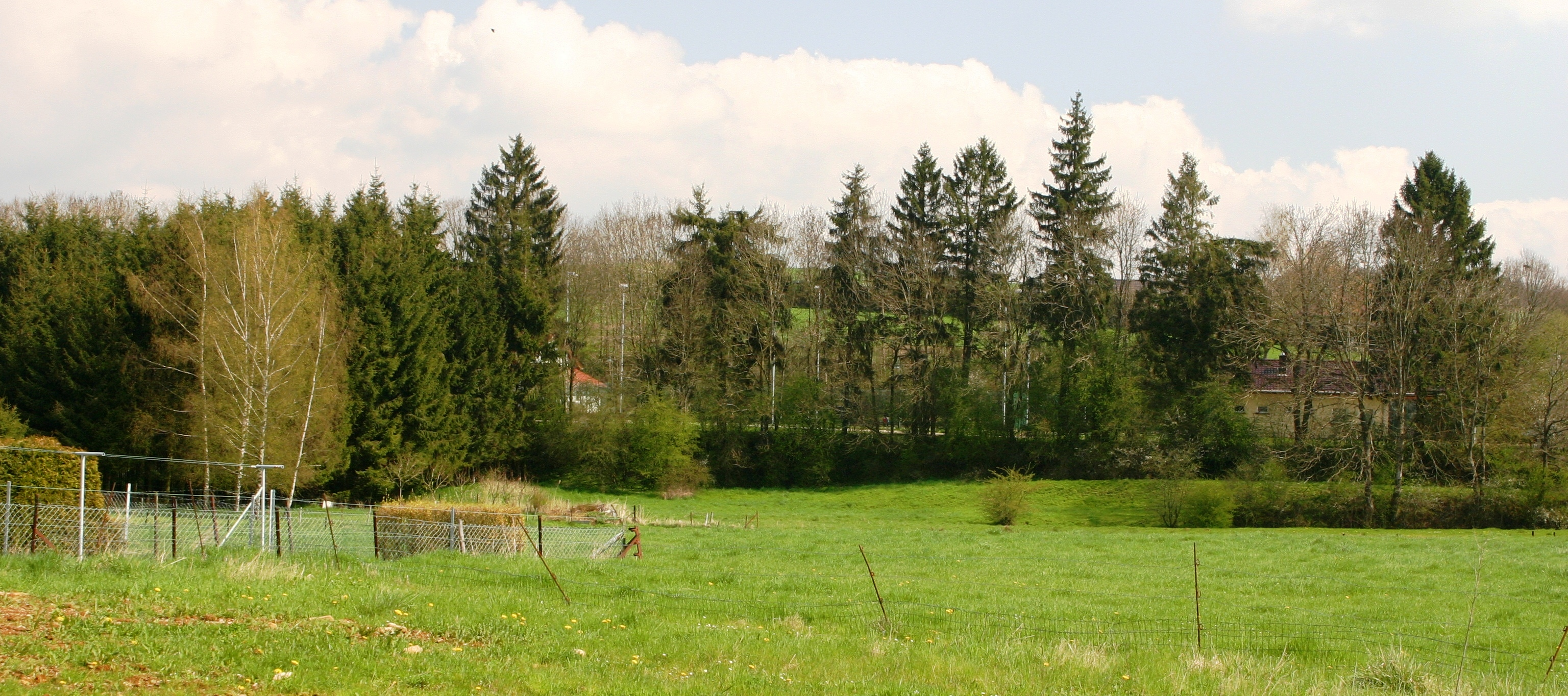 Ander Mëtt vum Bild d'Plaz wou fréier d'Peschmille stoung, vun der Ënneschtgass vum Haff Beim Riterchen aus fotograféiert. Kategorie:Millen zu Lëtzebuerg Kategorie:Gemeng Kënzeg